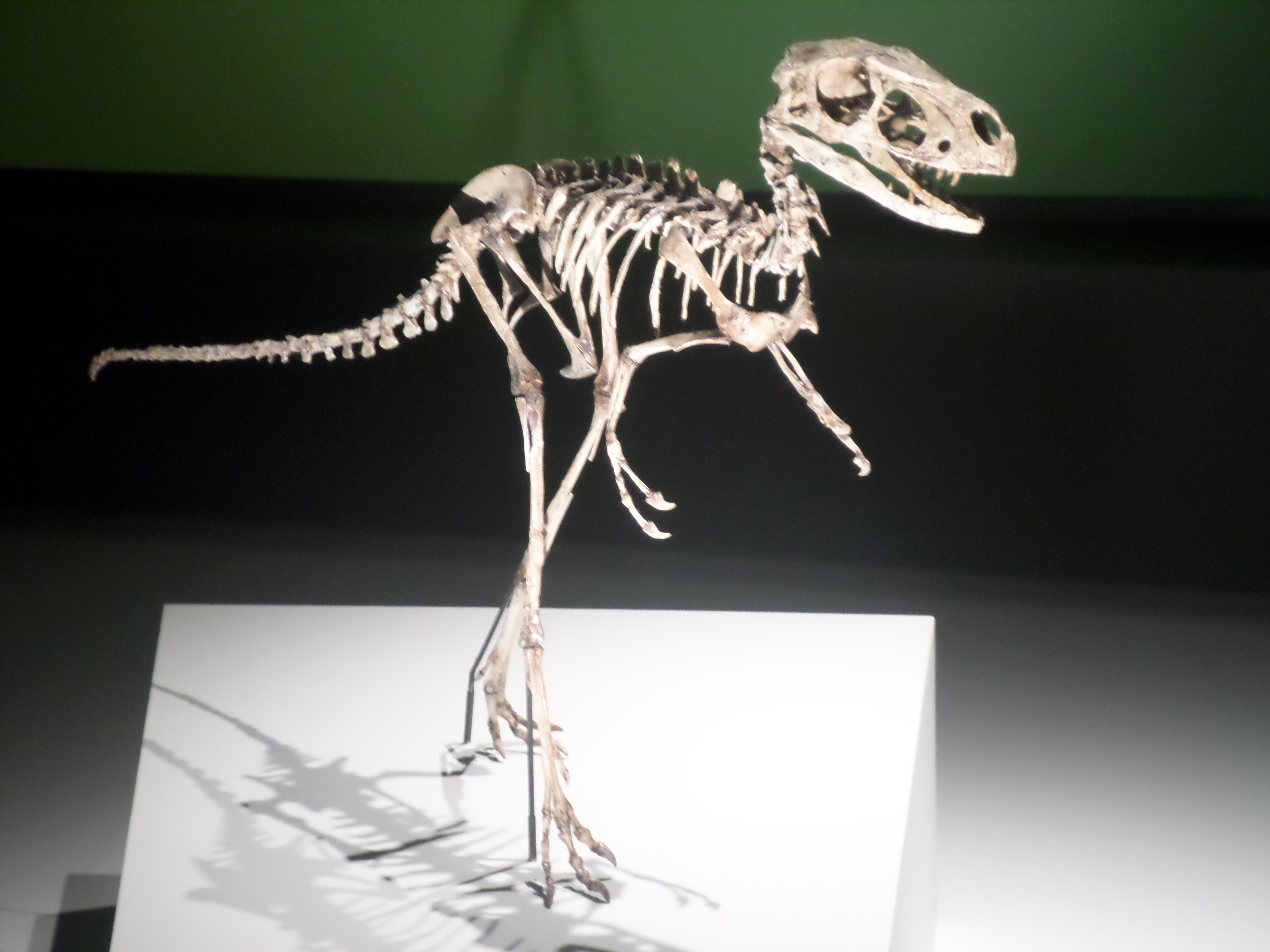 SAMSUNG CAMERA PICTURES